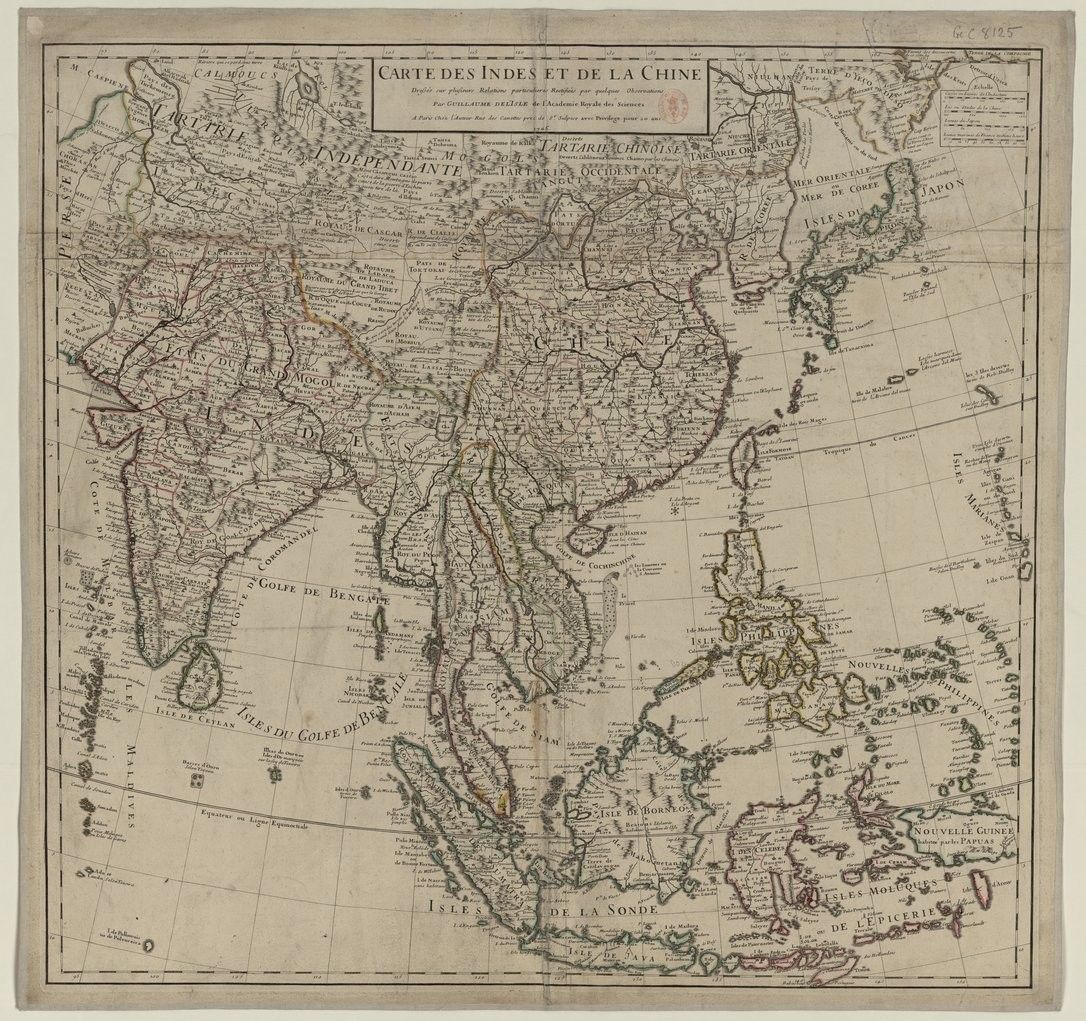 Carte des Indes et de la Chine par Guillaume de l'Isle - 1705